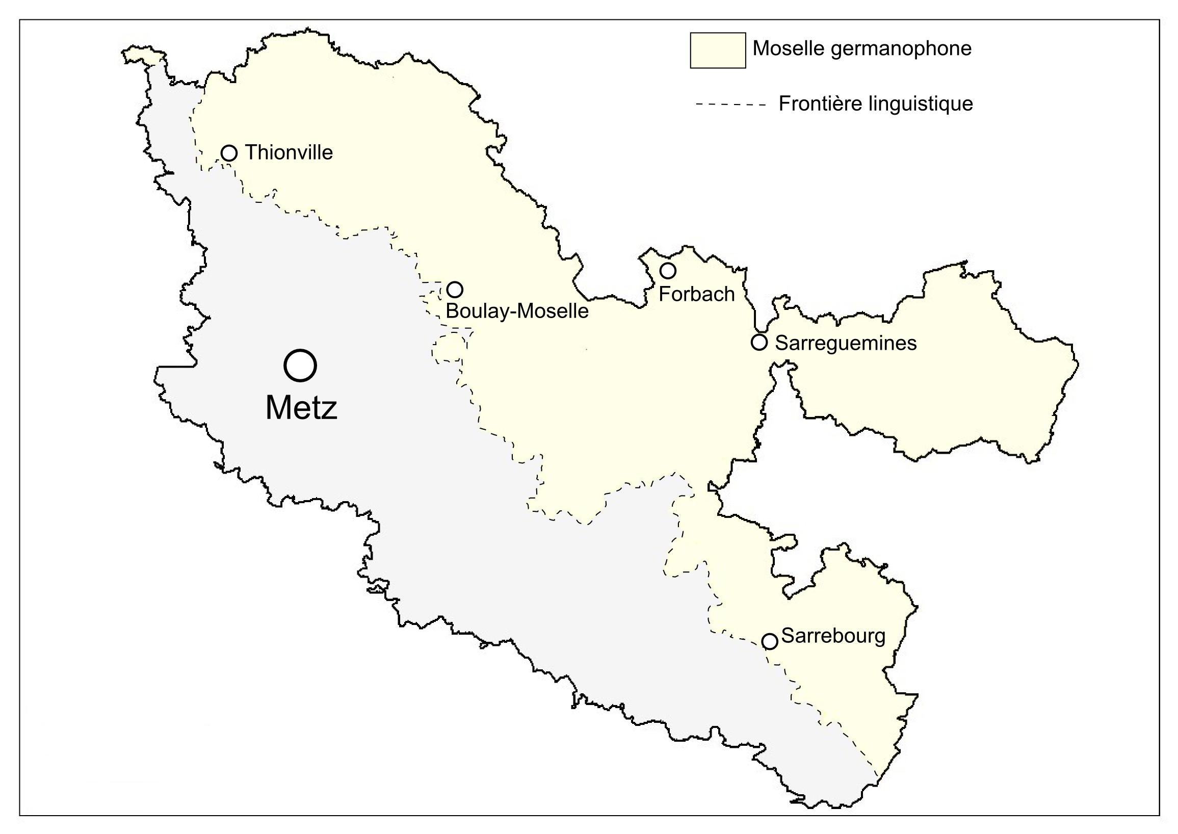 Carte présentant la moselle germanophone